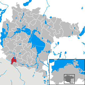 Massow im Landkreis Müritz, Mecklenburg-Vorpommern